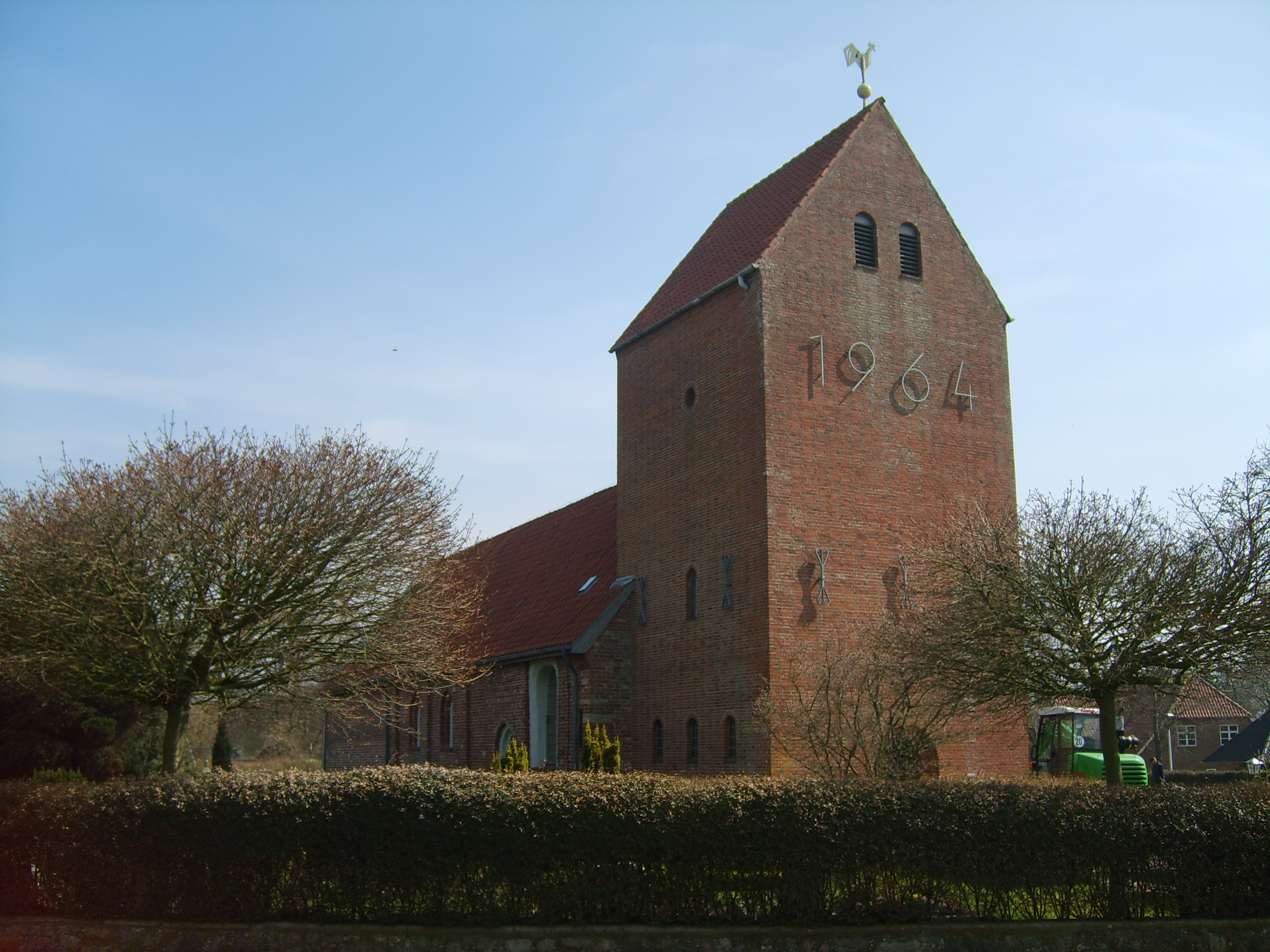 Apostelkirche in Deezbüll, Nordfriesland